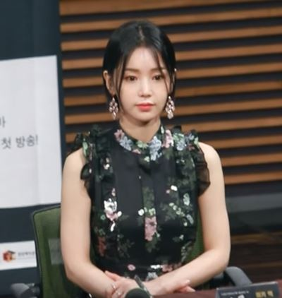 2일 오후 서울시 마포구 상암동 MBC 골든마우스홀에서 MBC 특별기획 ‘이몽’ 제작발표회가 열려 배우 임주환X남규리X이요원X유지태가 포토타임을 갖고 있다.